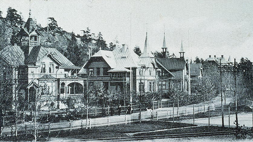 Några av Sjuvillorna vid Ringvägen i Saltsjöbaden